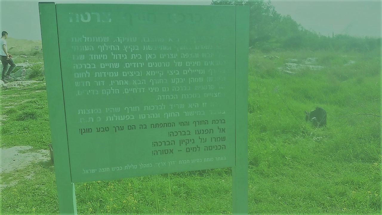 שלט הכניסה לבריכת צארטה